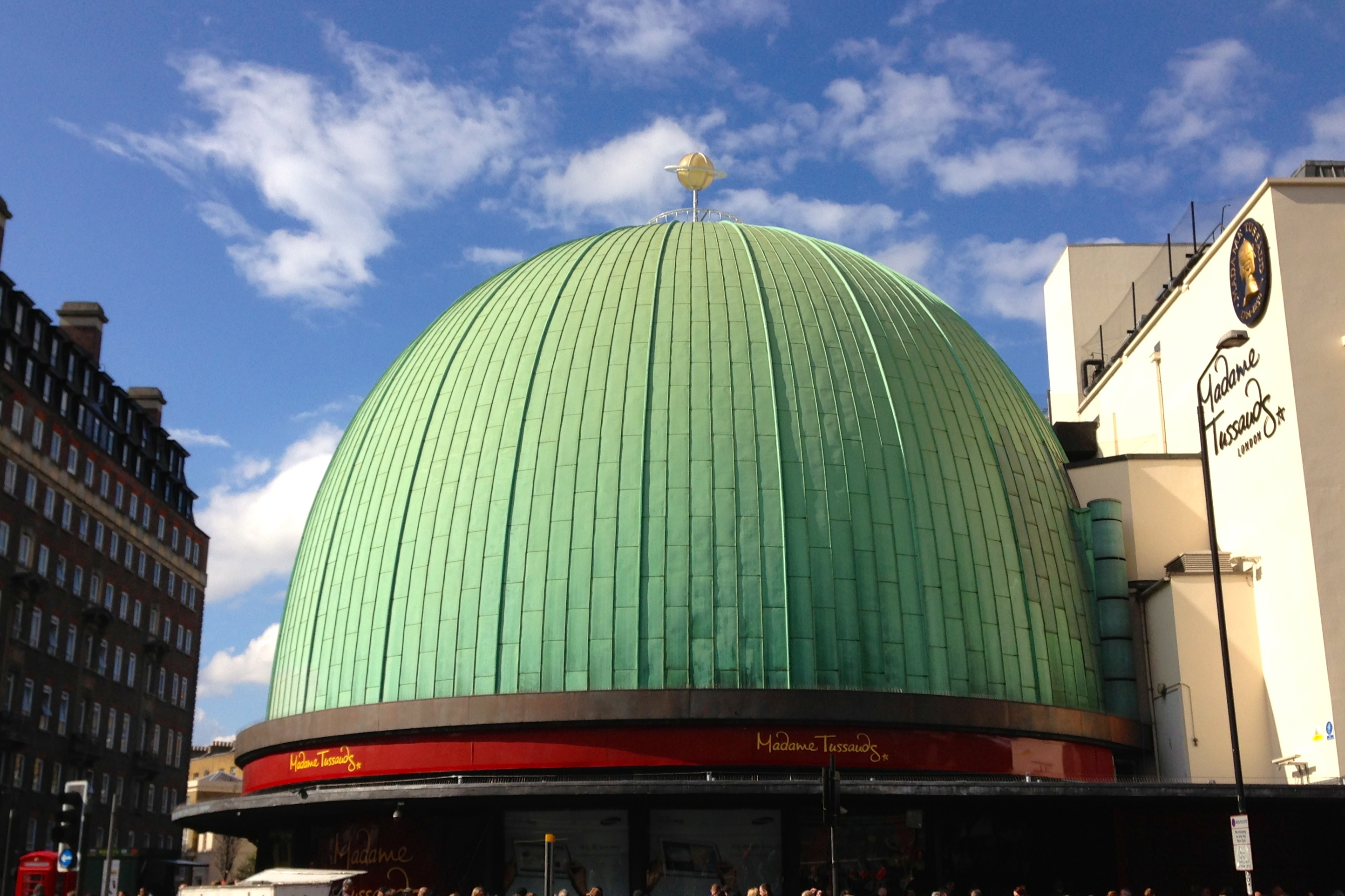 Madame Tussaud's